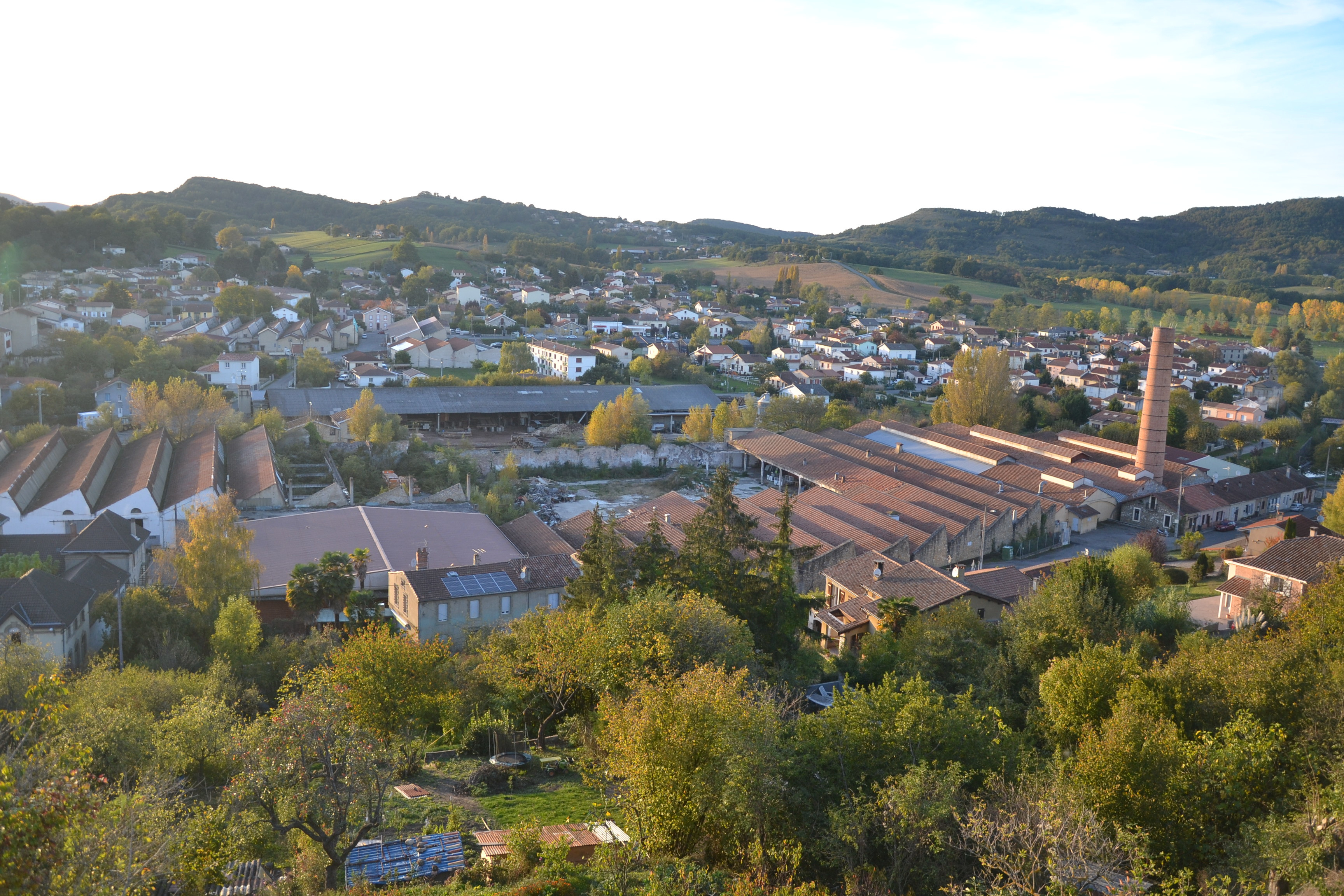 Vue sur le village de Laroque-d'Olmes, dont l'ancienne usine textile Fonquernie (Ariège, France).